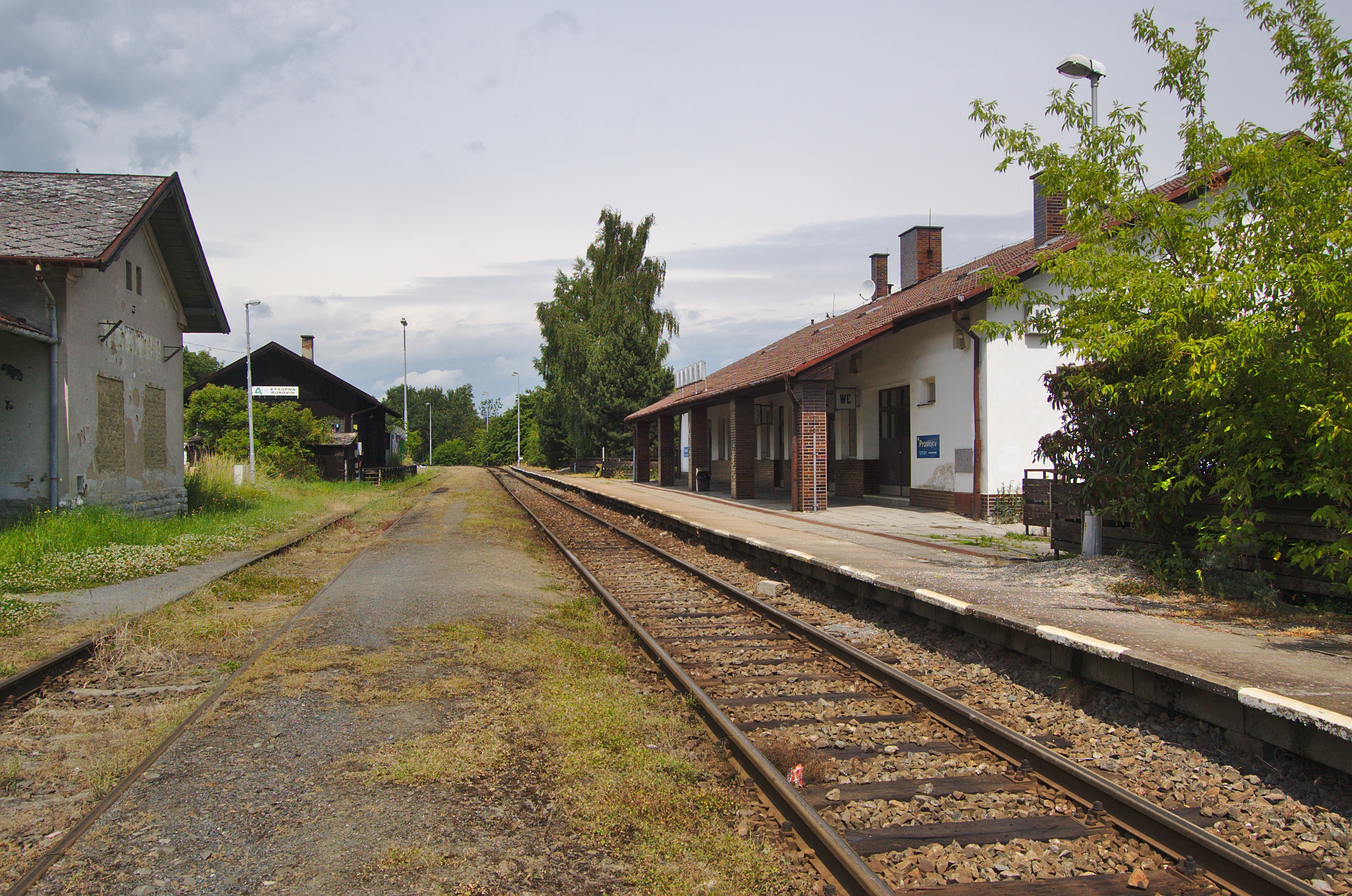 Vlakové názdraží Konice, okres Prostějov